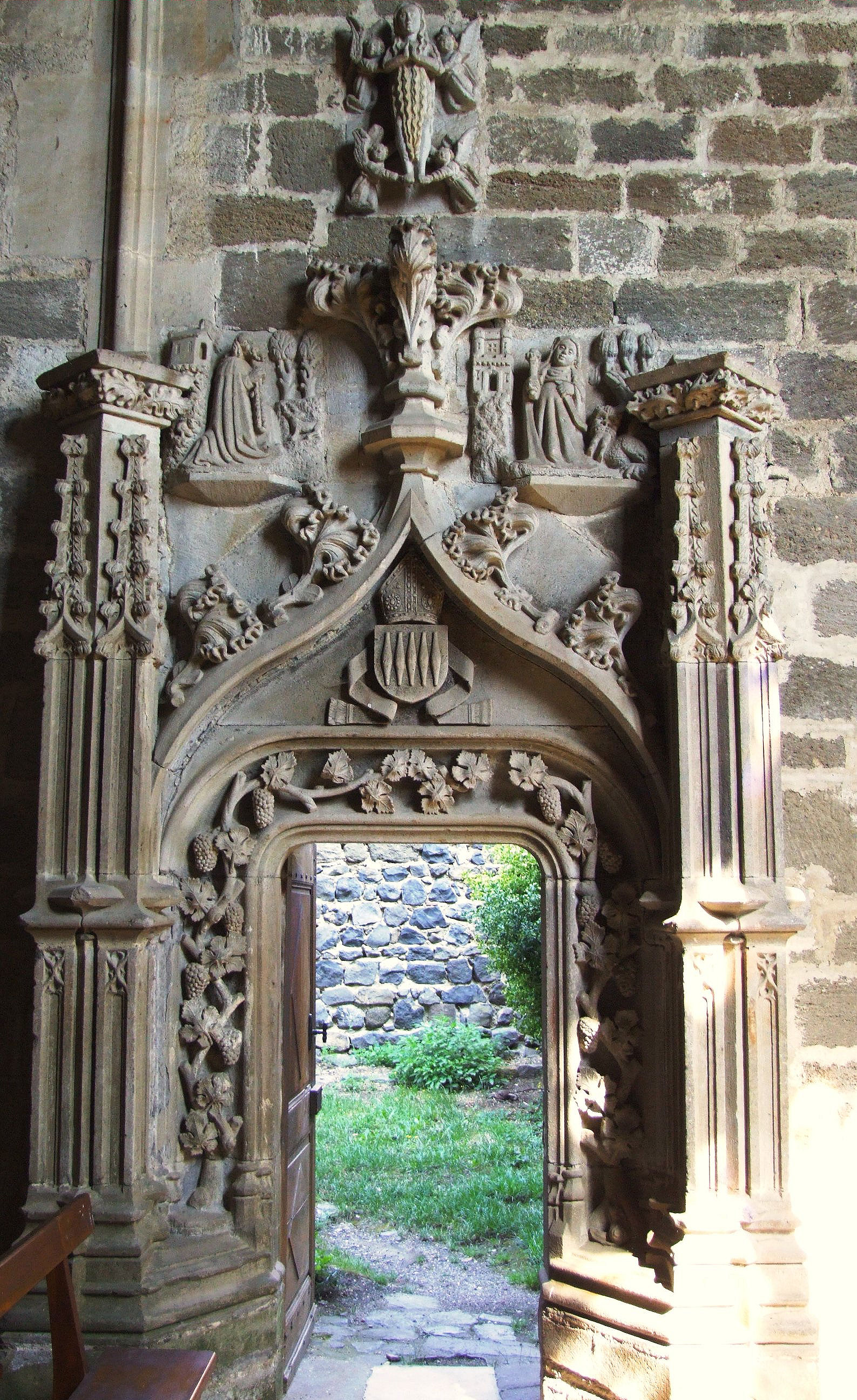 Chanteuges - Prieuré - Portail de la chapelle Sainte-Anne -1